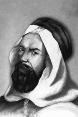 Portrait du Cheikh Mohamed Ameziane Belhaddad